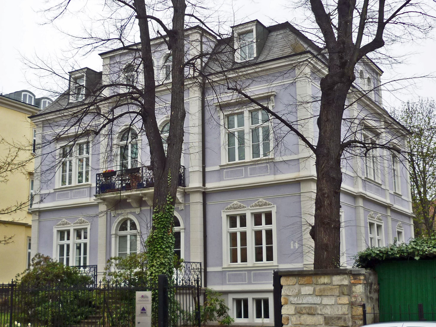 Kaitzer Str. 14 in Dresden-Südvorstadt